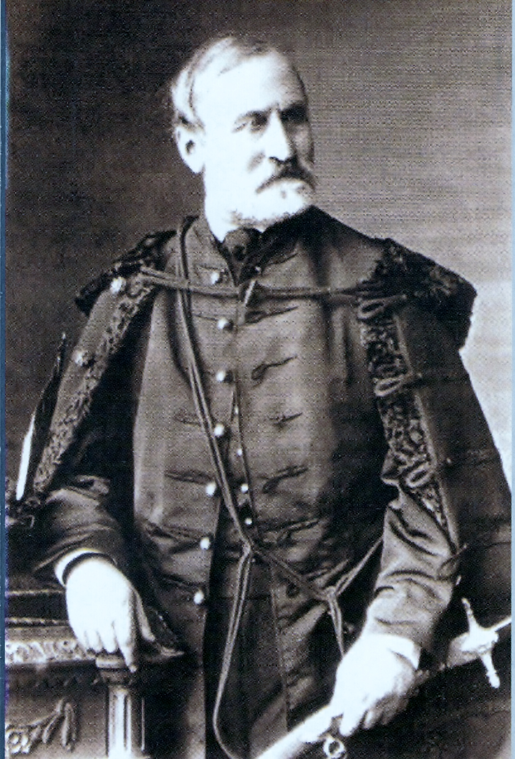 Majiteľ Štrbského Plesa a zakladateľ tatranskej osady Štrbské Pleso gróf Szentiványi